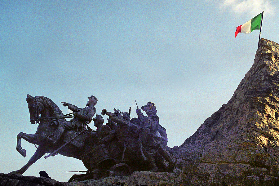 Monumento battaglia Castel Fidardo dimension and modified color